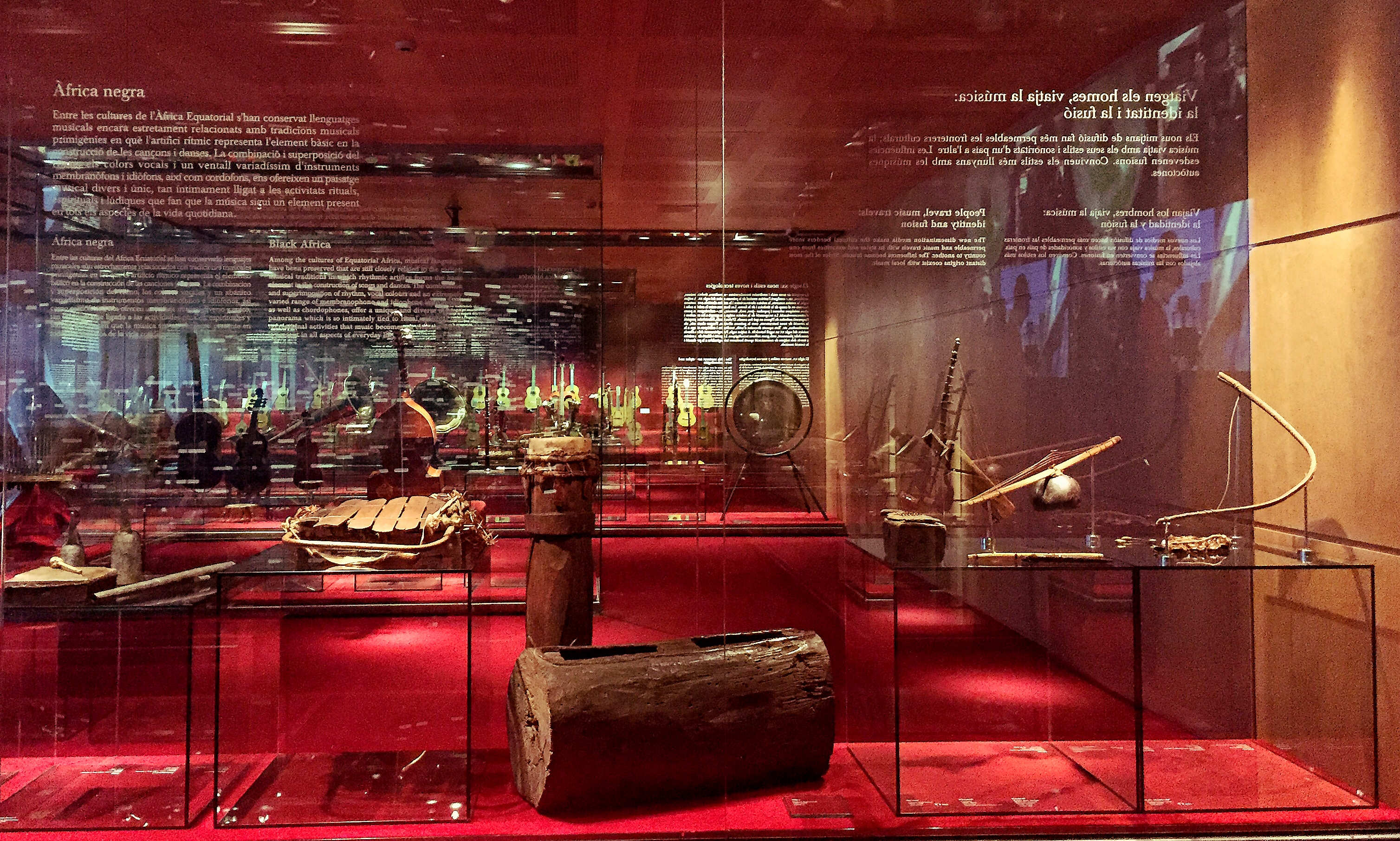 Representsció d'instruments musicals africans que es troben al Museu decla Música.